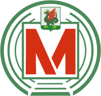 логотип МУП "Метрроэлектротранс"